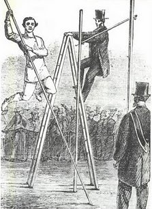 Robert Musgrove Pole vault Hornsey Wood 1861